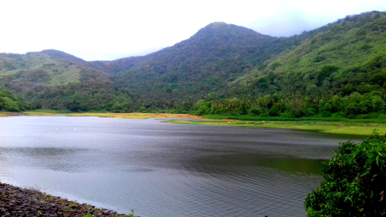 GUNDAAR DAM WITH HILLS VIEW